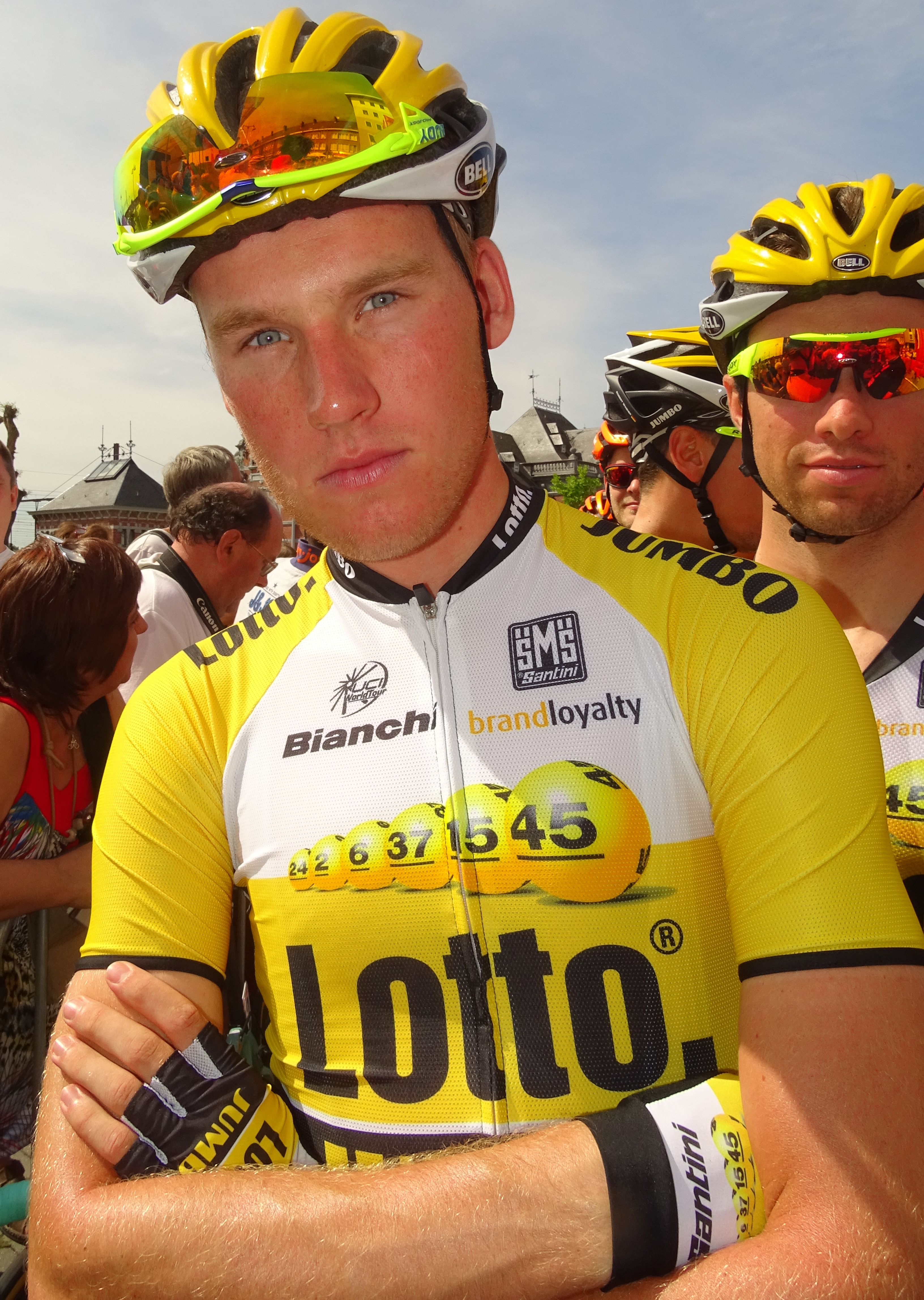 Reportage réalisé le mercredi 22 juillet à l'occasion du départ du Grand Prix Pino Cerami 2015 à Saint-Ghislain, Belgique.